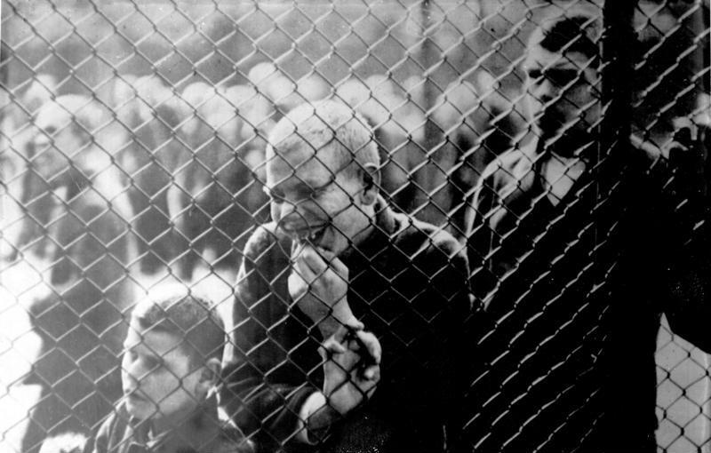 This description has been identified as biased or incorrect: Original description is from Nazi era and directed against the mentally ill.Erbkrank! Eine interessante Ausstellung zur Aufklärung des Volkes über erbgesunden Nachwuchs wurde vom Reichsausschuss für Volksgesundheitsdienst in Berlin eröffnet! Ein erschreckendes Bild von Erbkranken in einer Idioten-Anstalt.